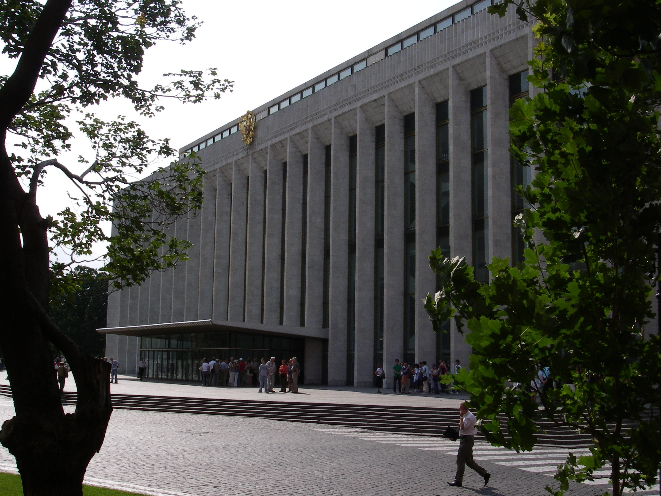 State Kremlin Palace